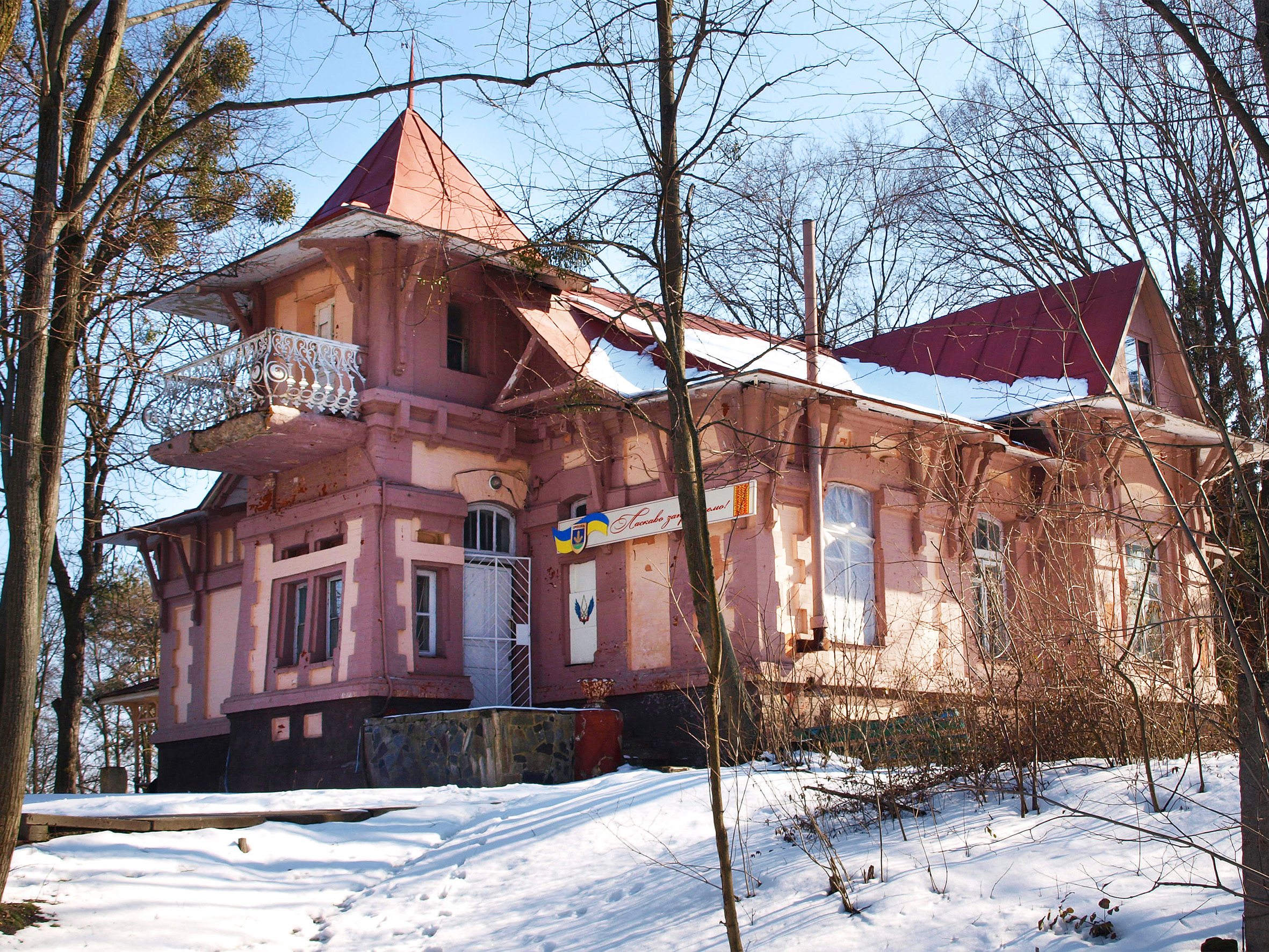 Дача київського фабриканта Миколи Чоколова. З 1936 року - Будинком творчості спілки письменників України. (Ірпінь)